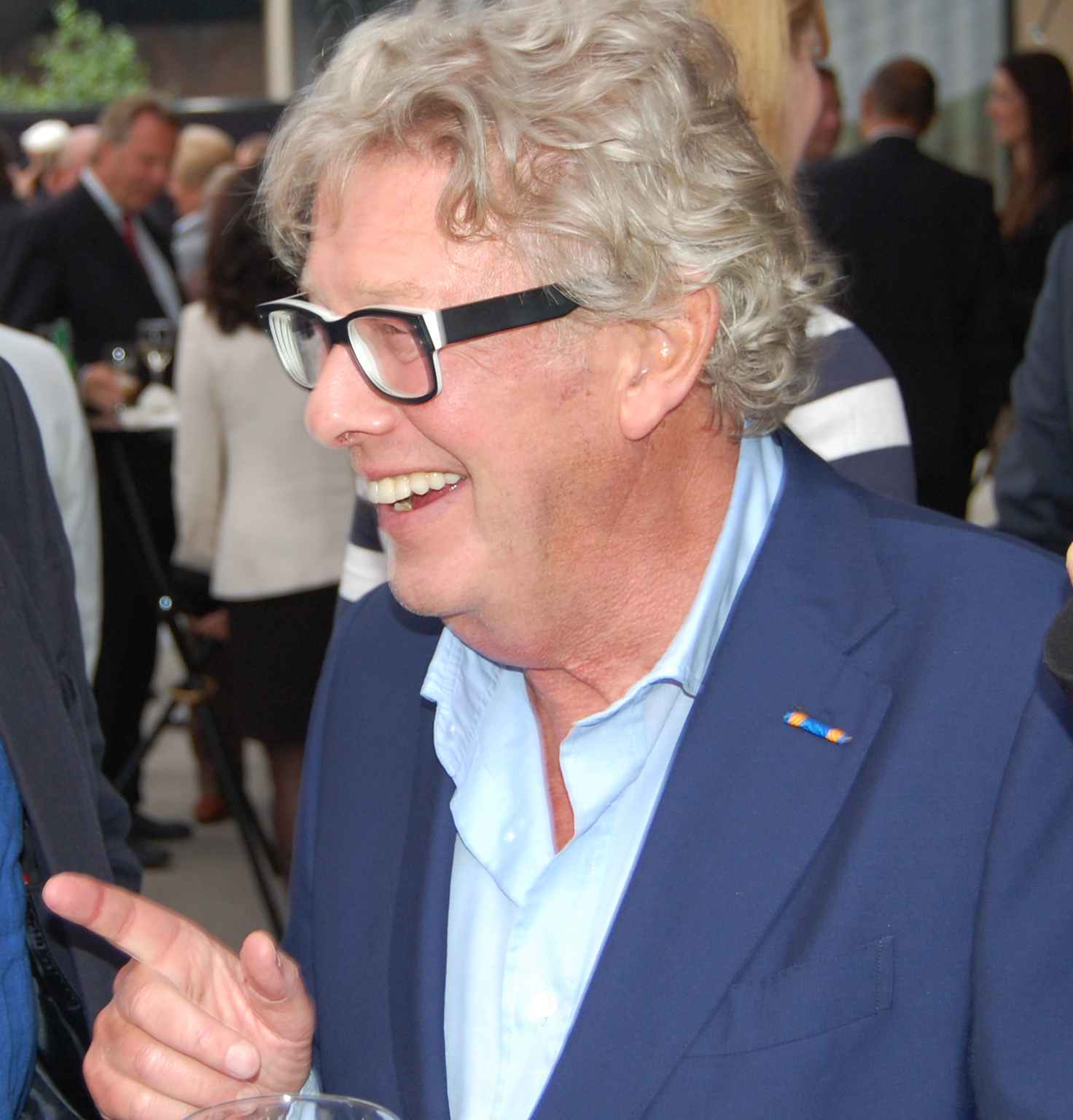 Jan des Bouvrie, Haringparty van Hilton & Wegener in Amsterdam, 7 juni 2011